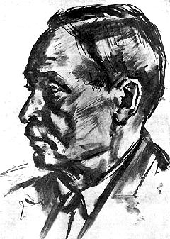 А. Бразер. «Янка Купала». Бумага, тушь. Около 1926 г.